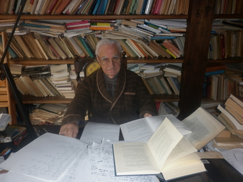 Antonio La Penna alla sua scrivania.